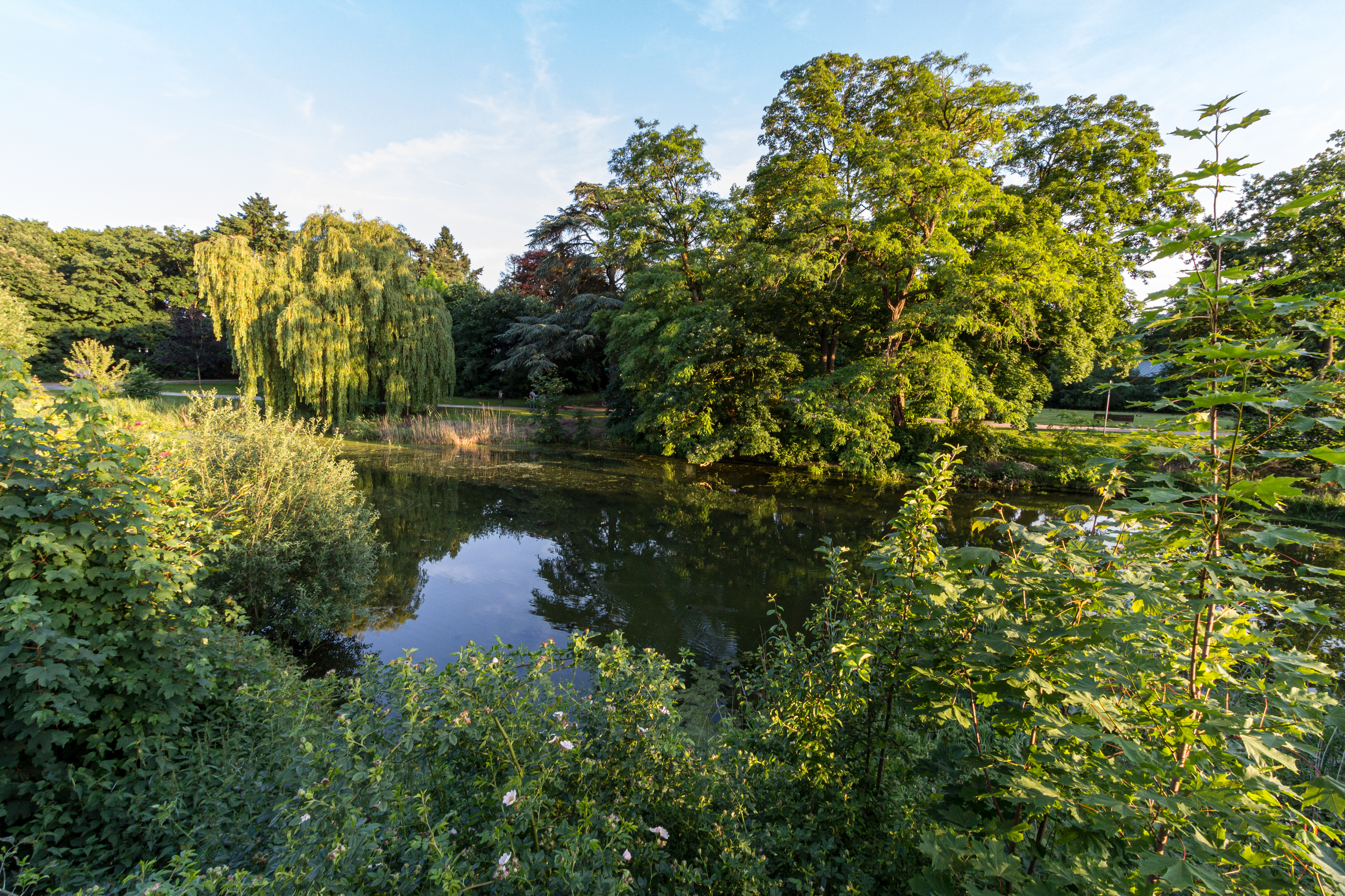 Schlosspark (ehem. Garten des im Zweiten Weltkrieg zerstörten Schlosses), Dülmen, Nordrhein-Westfalen, Deutschland